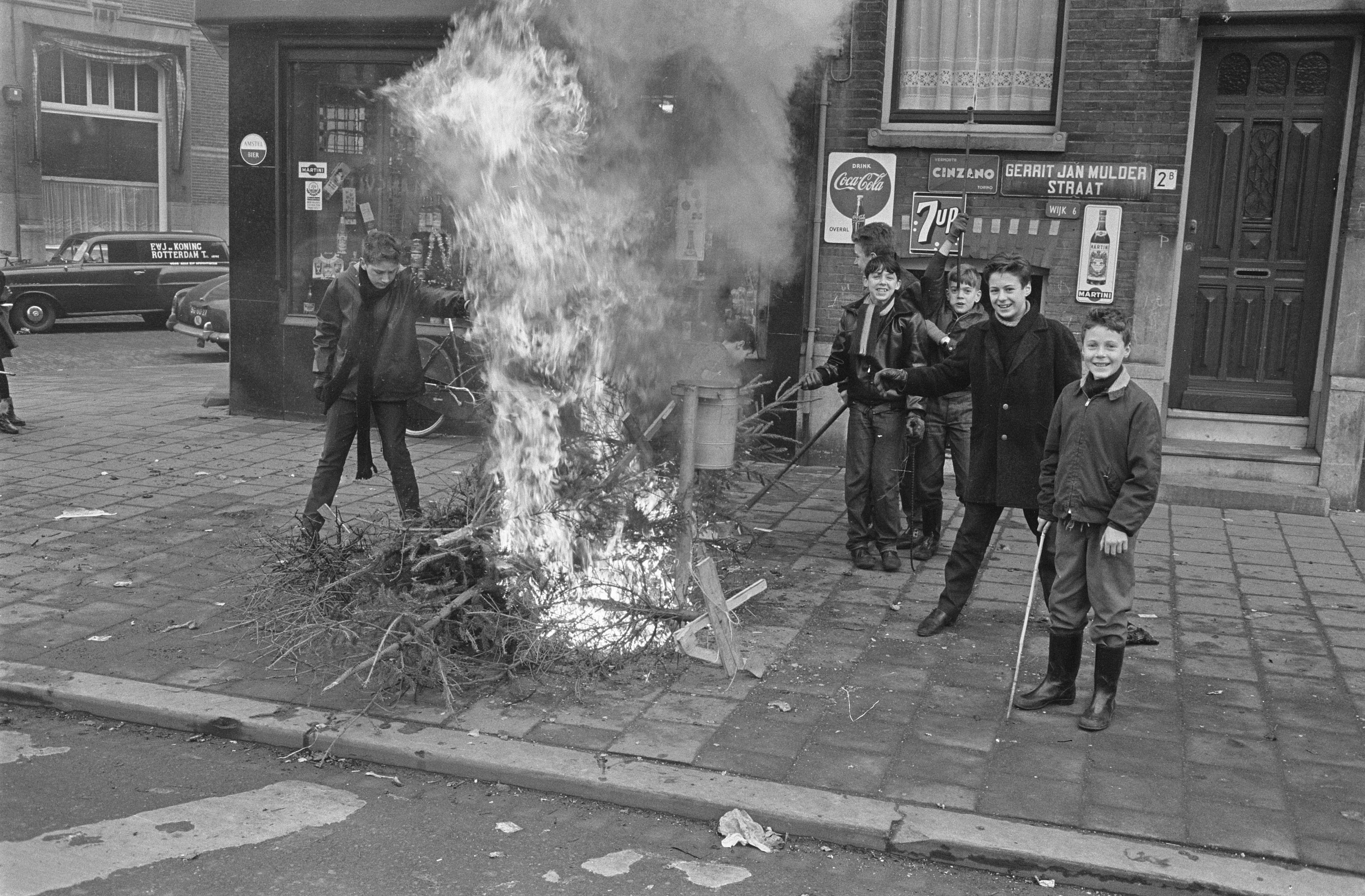 Collectie / Archief : Fotocollectie Anefo Reportage / Serie : [ onbekend ] Beschrijving : Kerstboombrandjes door de jeugd in Rotterdam Datum : 2 januari 1964 Locatie : Rotterdam, Zuid-Holland Trefwoorden : Jeugd, branden, kerstbomen Fotograaf : Walta, Winfried / Anefo Auteursrechthebbende : Nationaal Archief Materiaalsoort : Negatief (zwart/wit) Nummer archiefinventaris : bekijk toegang 2.24.01.05 Bestanddeelnummer : 915-8982